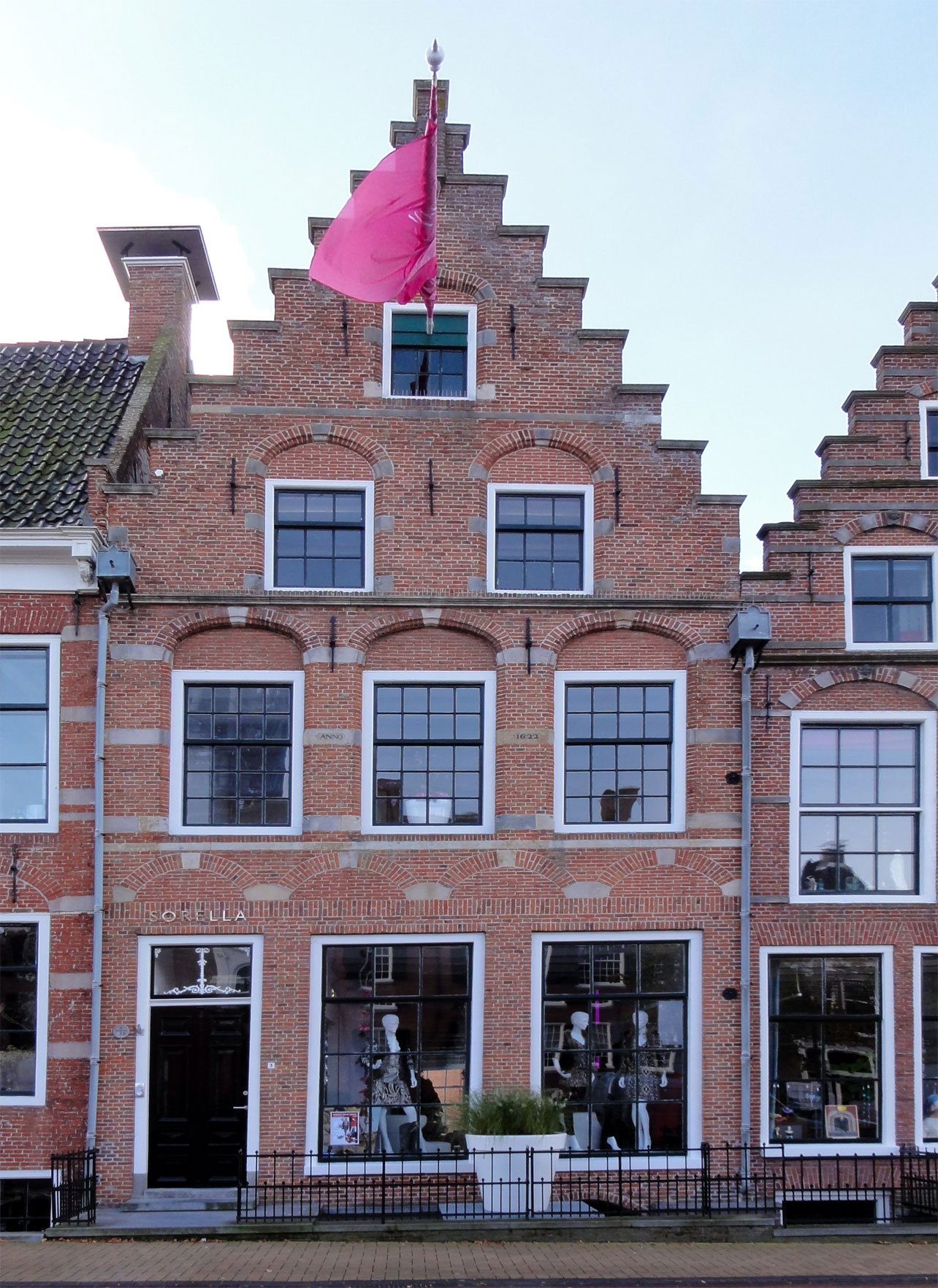 De Zijl 3 Dokkum. rijksmonument